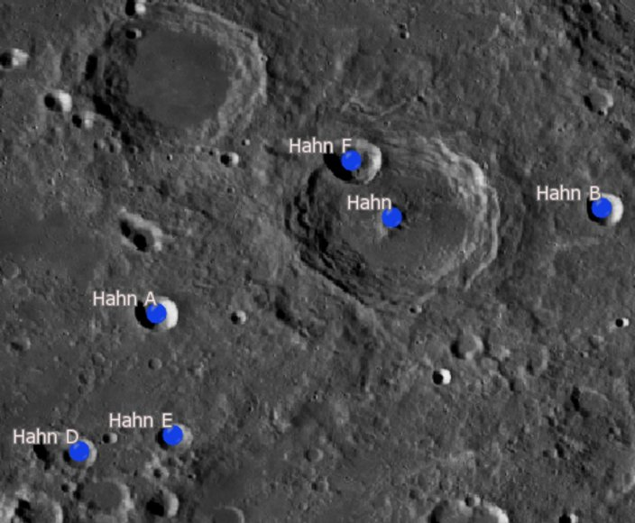 Cráter lunar Hahn. Cráteres satélite. (Imagen LRO)